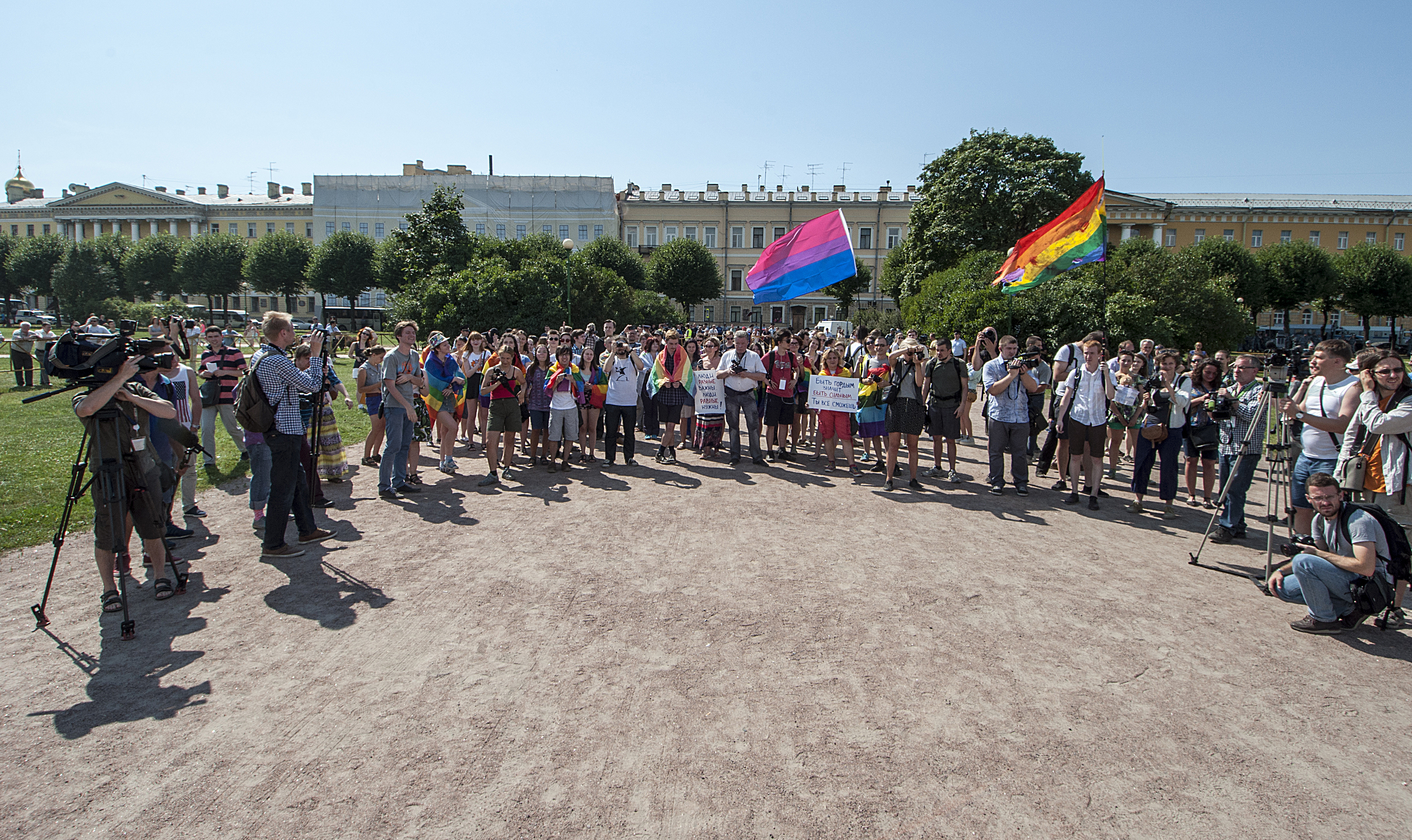 26/07/2014. Санкт-Петербург, Марсово поле. Публичная акция в рамках Пятого Санкт-Петербургского прайда. © Alek Naza